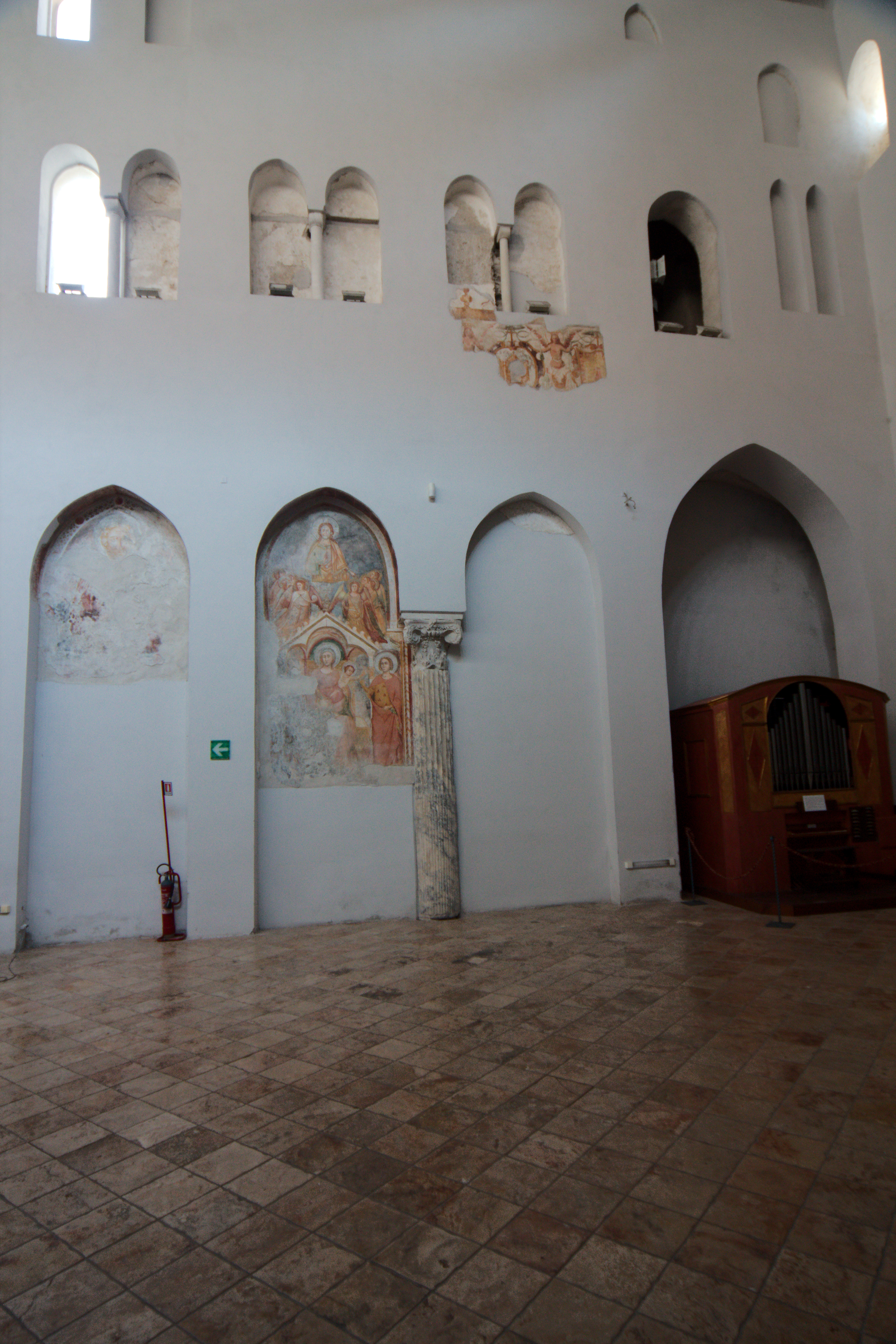 Basilica del Crocifisso